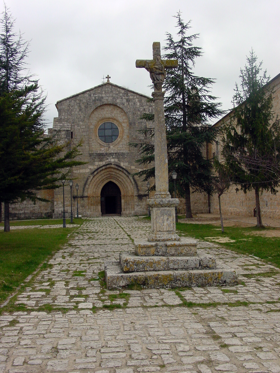 Monasterio cisterciense de Santa María de Valbuena en el término de Valbuena de Duero (Valladolid). Camino que conduce a la fachada principal de la iglesia. Las dependencias del monasterio quedan a la derecha de la fotografía. En primer término, un crucero de piedra.